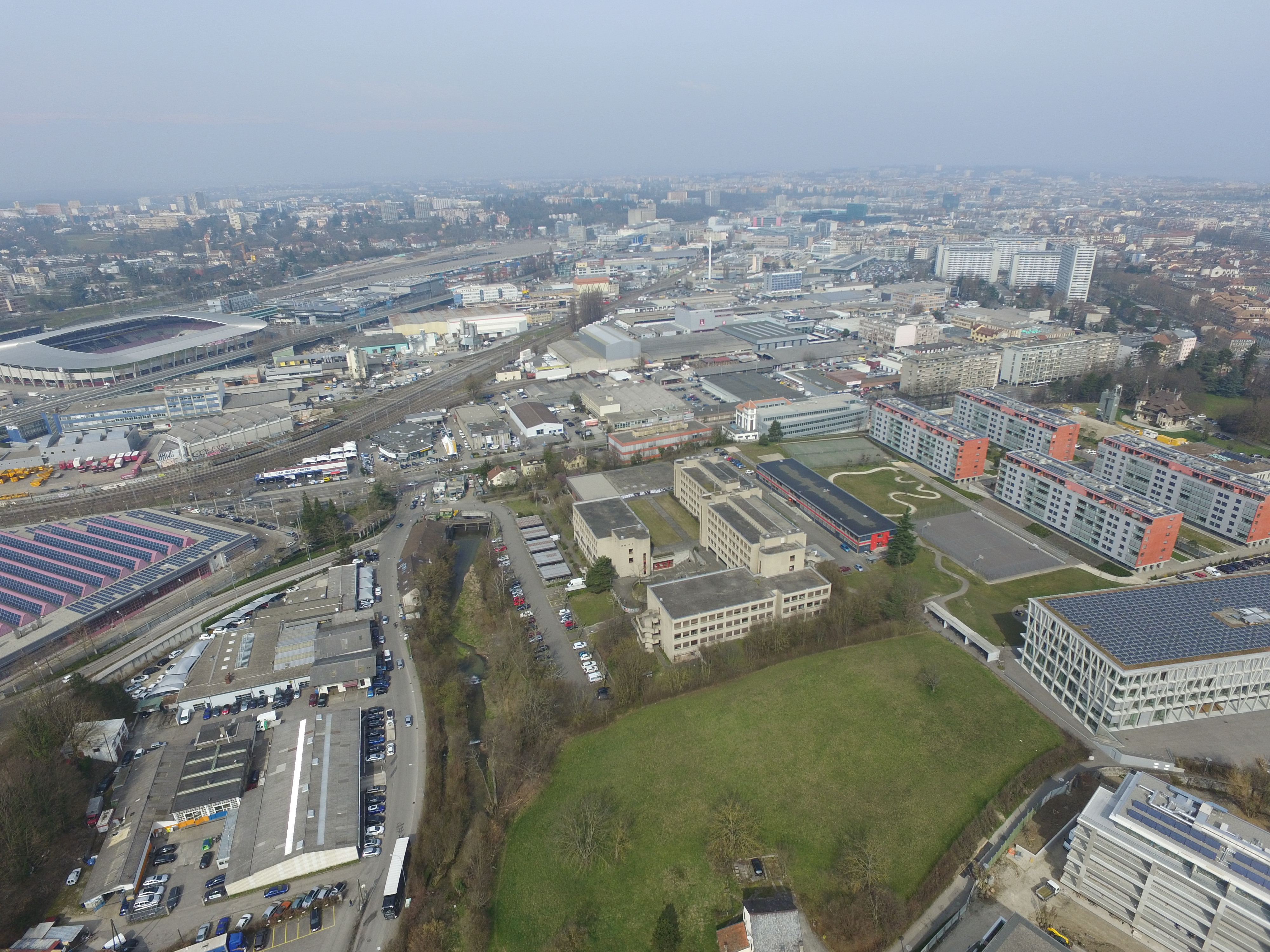 Collège Madame de Staël, vue aérienne